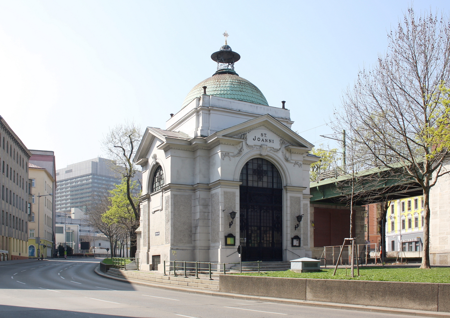 Die St.-Johannes-Nepomuk-Kapelle am inneren Währinger Gürtel in Wien.